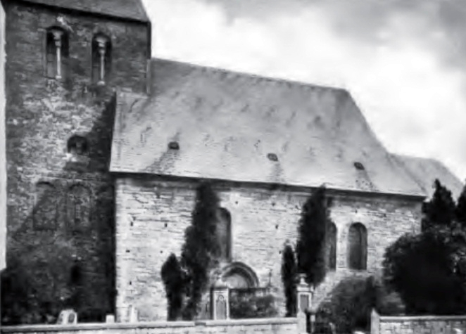 Evangelische Kirche in Bad Sassendorf Lohne, Aufnahme von 1899